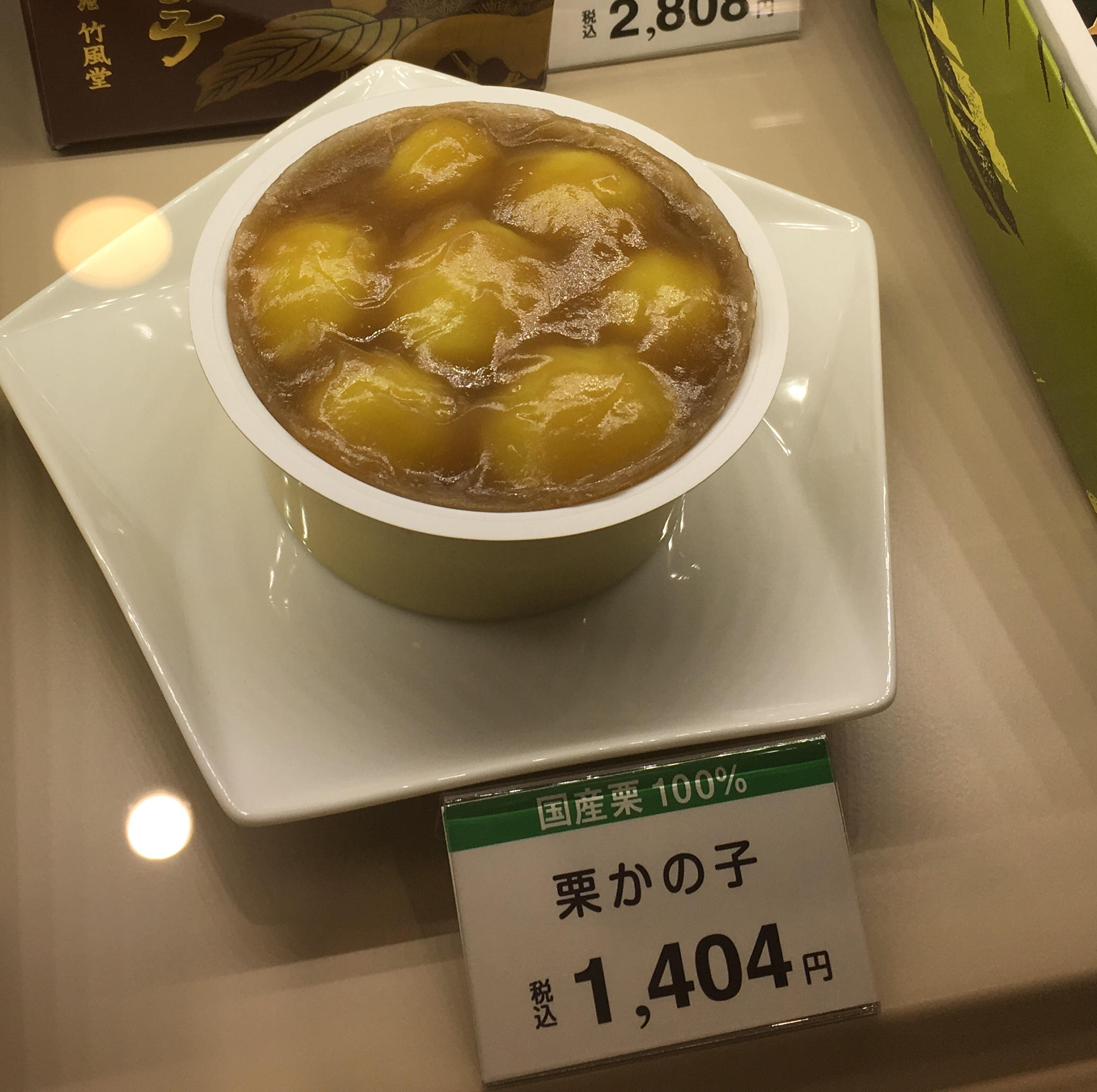 栗かの子、長野市にて (Nagano Kurikanoko)